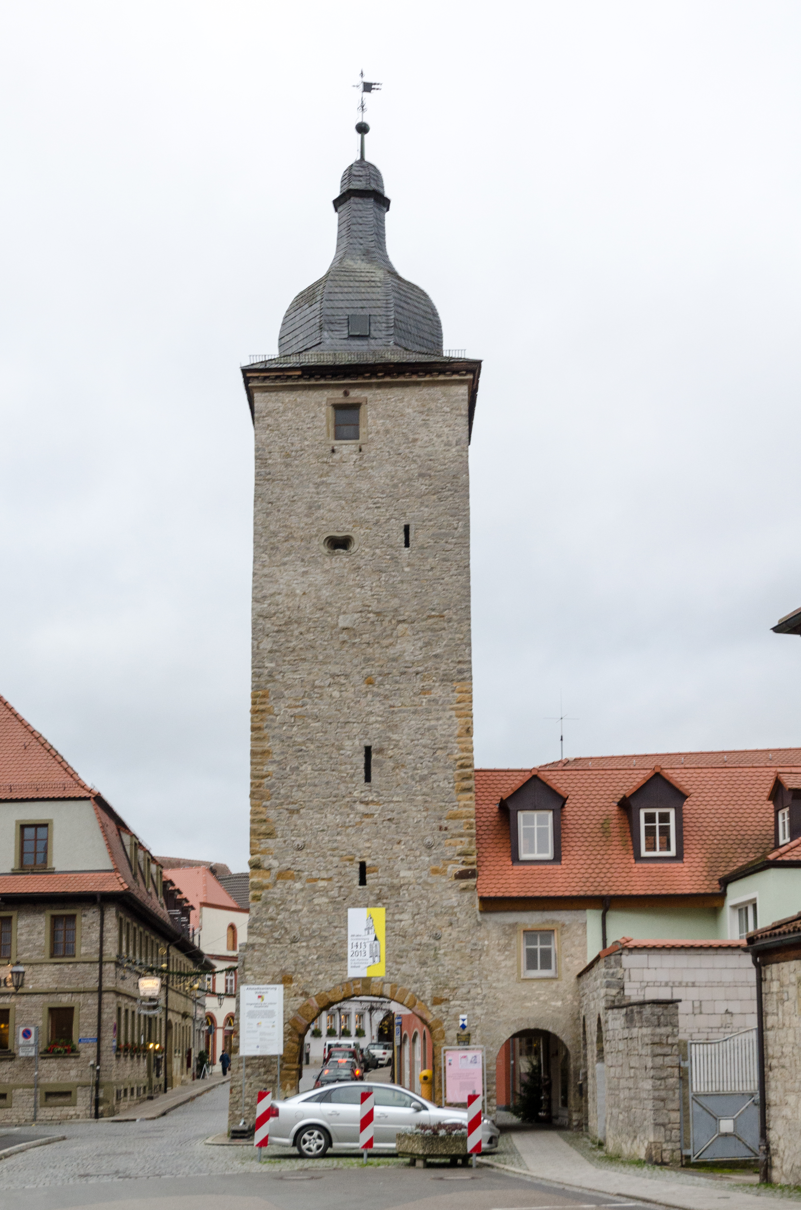 Volkach, Gaibach Torturm